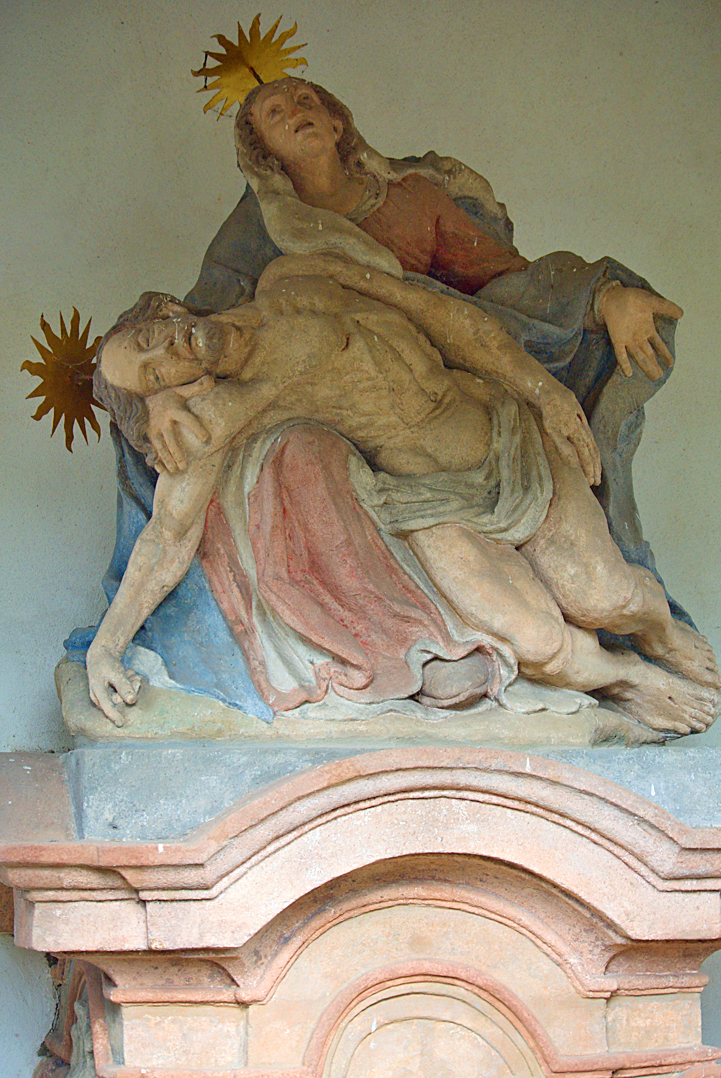 Kaple, ve východní části obce, jihovýchodně od domu čp. 98, Žibřidice.